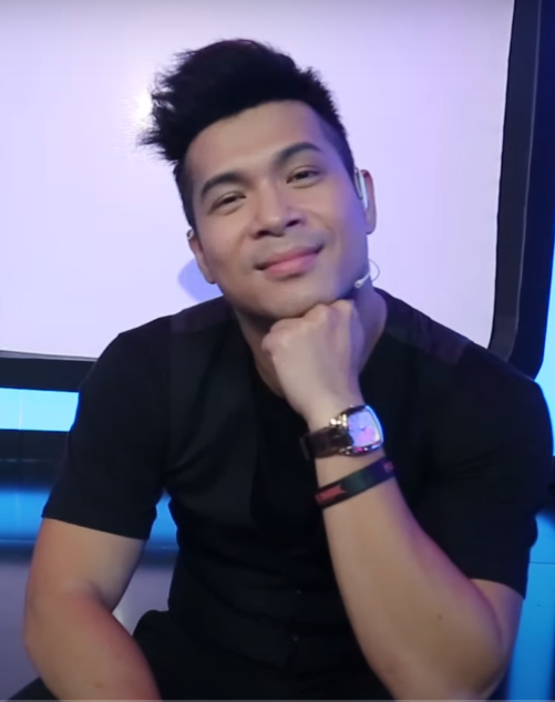 Việt Hương vừa trở lại đã đòi mai mối cho voi biển Trương Thế Vinh - Hậu Trường Tần Số Tình Yêu mùa 2 Trương Thế Vinh, ảnh chụp màn hình từ video của BEE Entertainment / Giải Trí (screen capture from video of BEE Entertainment / Giải Trí)